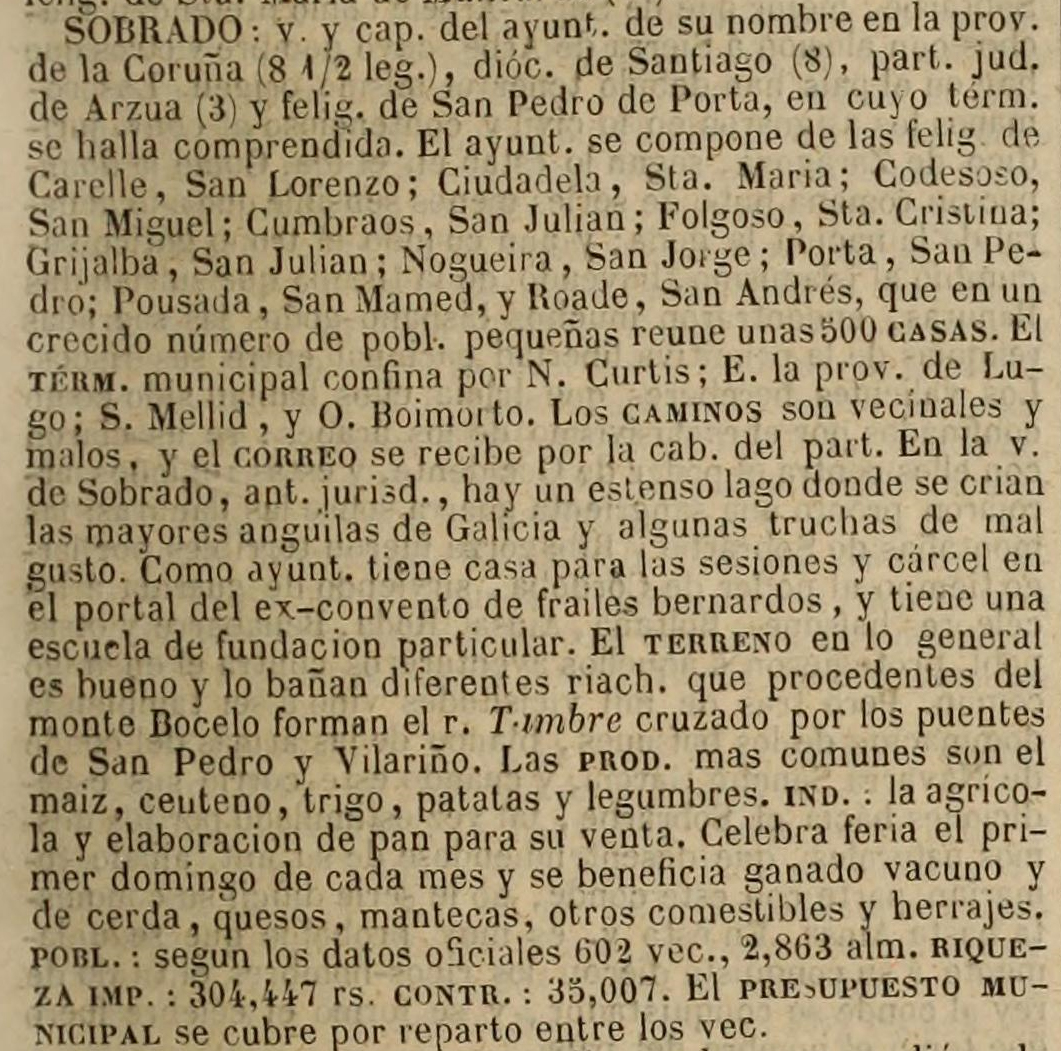 Concello de Sobrado no Diccionario geográfico-estadístico-histórico de España y sus posesiones de Ultramar.